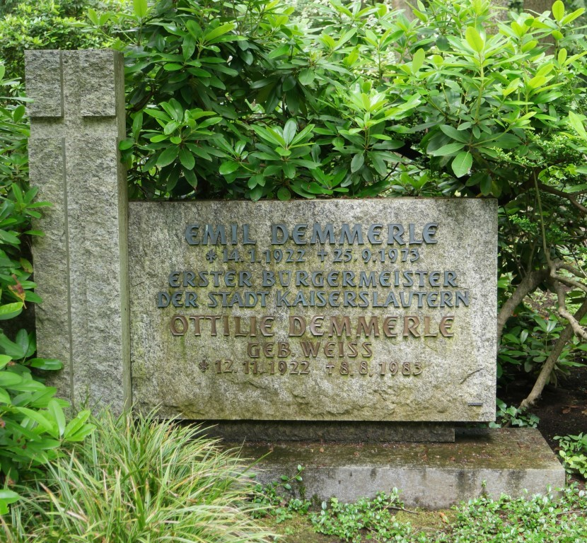 Grab des CDU-Politikers Emil Demmerle (1922-1973) auf dem Hauptfriedhof Kaiserslautern